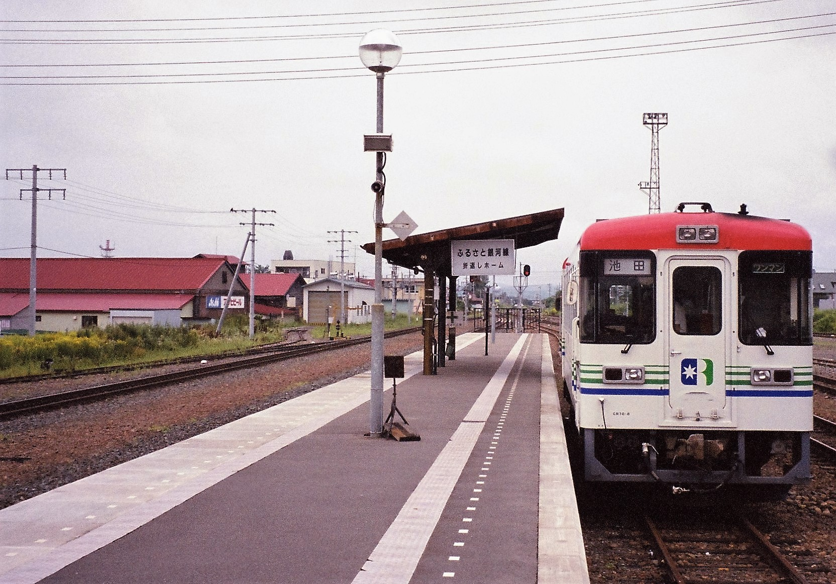 池田駅専用ホームに停車中の北海道ちほく高原鉄道列車（2000年8月）